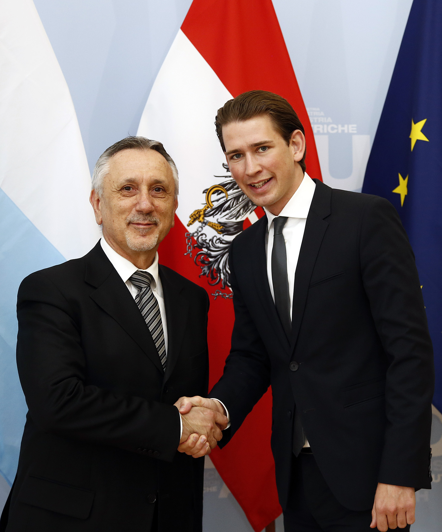 Ministerkomitee des Europarates. Außenminister Sebastian Kurz trifft Pasquale Valentini, den Außenminister und Regierungschef von San Marino. 05.05.2014, Foto: Dragan Tatic